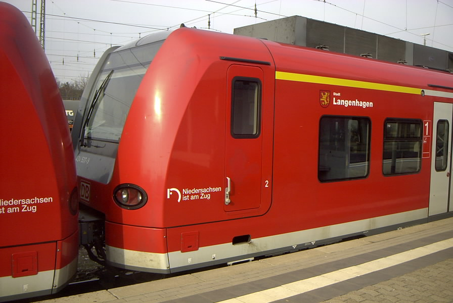 DB S-Bahn Triebwagen 424 537-9 der S-Bahn Hannover, benannt nach der Stadt Langenhagen, im Bahnhof von Nienburg/Weser.